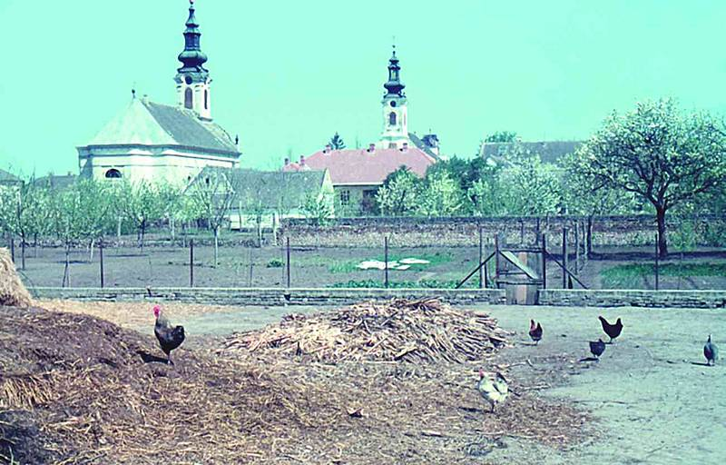 Torzsa evangélikus és református temploma (Vajdaság, Szerbia)